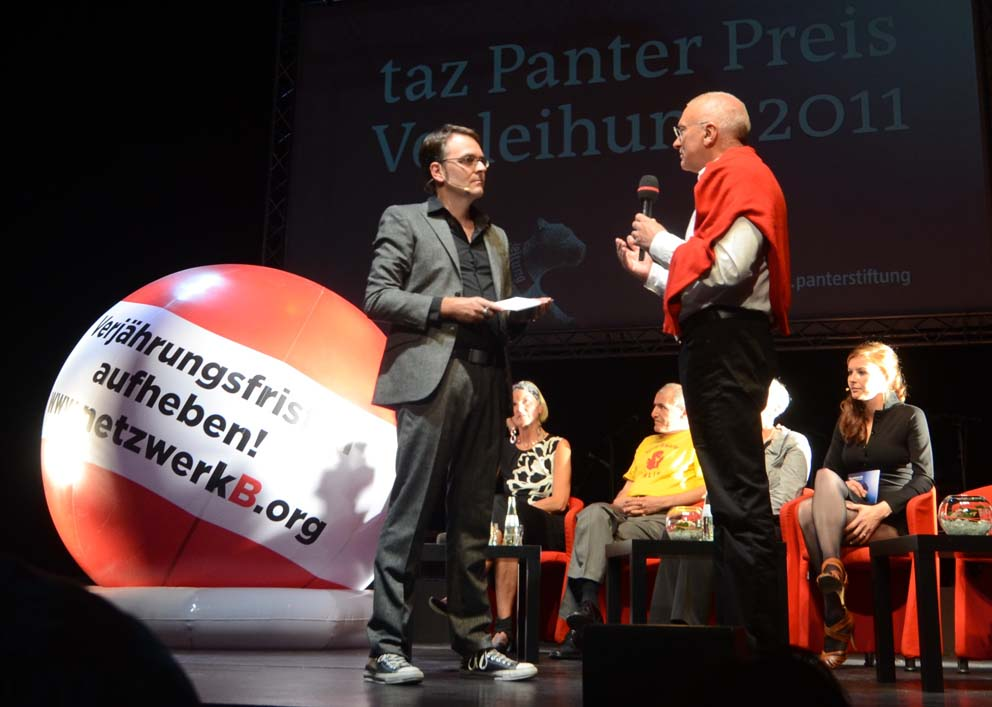 Norbert Denef bei der Veranstaltung "taz-Panther-Preis 2011"